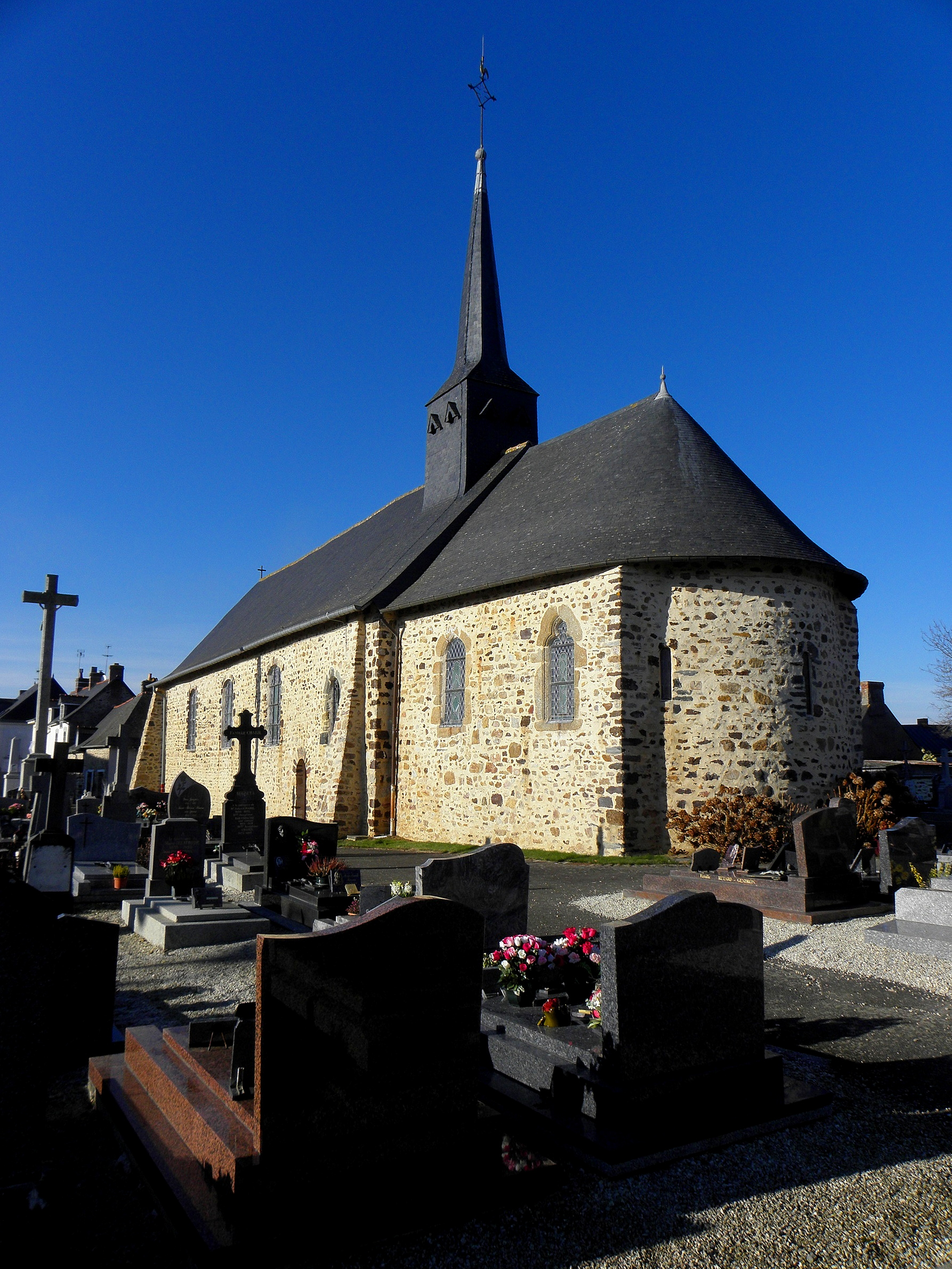 Église Notre-Dame-de-l'Assomption de Bréal-sous-Vitré (35). Vue méridionale.